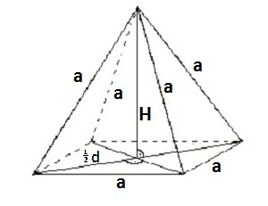 Rysunek pomocniczy do Twierdzenia Krzysztonia.